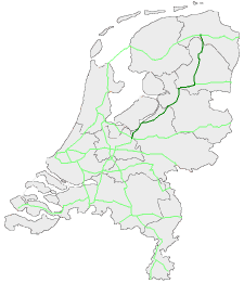 Locatie E232 (A28 Amf-Gn), zelf gemaakt